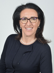 Valeria Valente, politica italiana